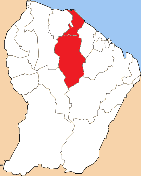 Situation du canton dans le département de la Guyane